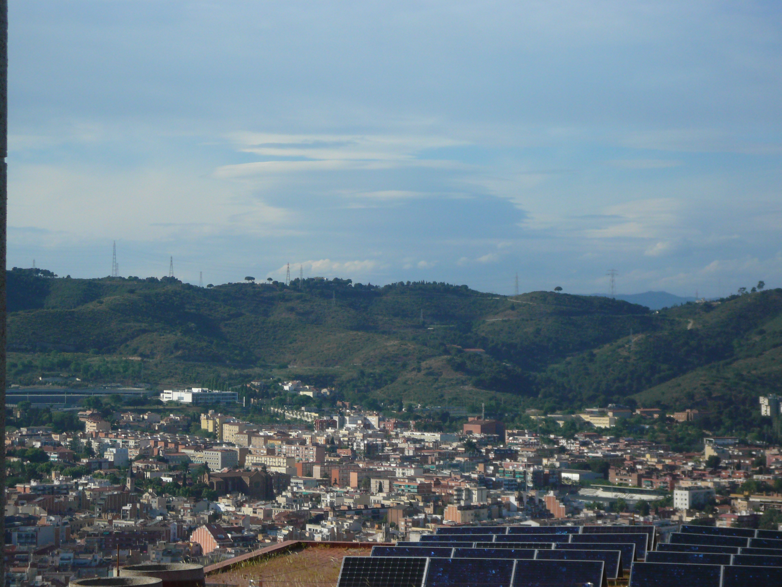 Vistes de la part occidental de la Serra de Collserola des del turó de la Rovira. This is a a photo of a natural area in Catalonia, Spain, with id: ES510066 Object location41° 26′ 24″ N, 2° 06′ 36″ E